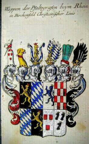 Wappen der Pfalzgrafen beym Rhein in Birkenfeld Christianischer Linie. Pfalzgrafen bei Rhein, Herzöge in Bayern, Fürsten zu Birkenfeld, Grafen zu Veldenz, Sponheim, Rappoltstein, Herren zu Hochenack und Geroldseck am Wasichen